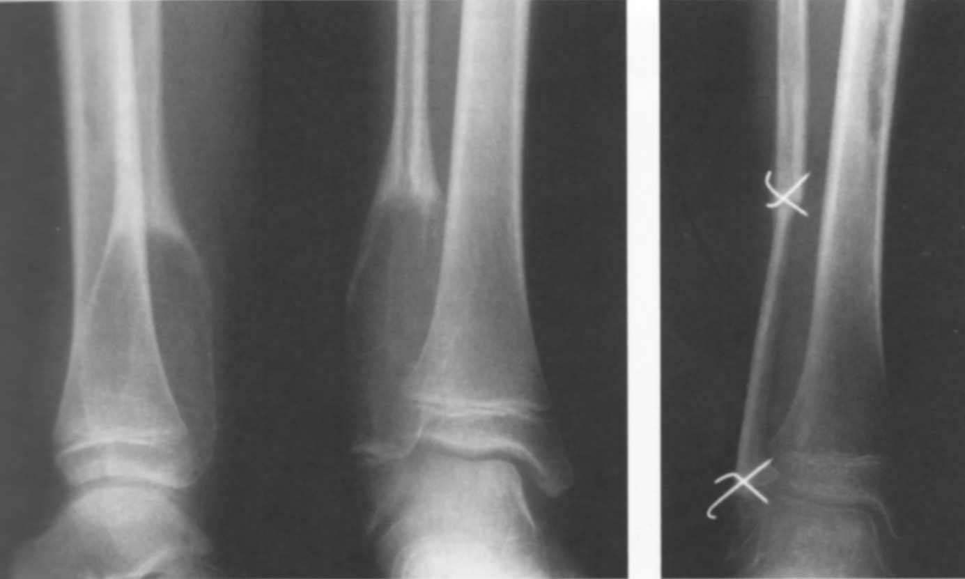 Aneurysmatische Knochenzyste im unteren Ende der Fibula bei 9-jährigem Mädchen. Kontrollaufnahme zwei Monate nach Kontinuitätsresektion und Überbrückung mit einem kortikospongiösen Span aus der Tibia (oben rechts).